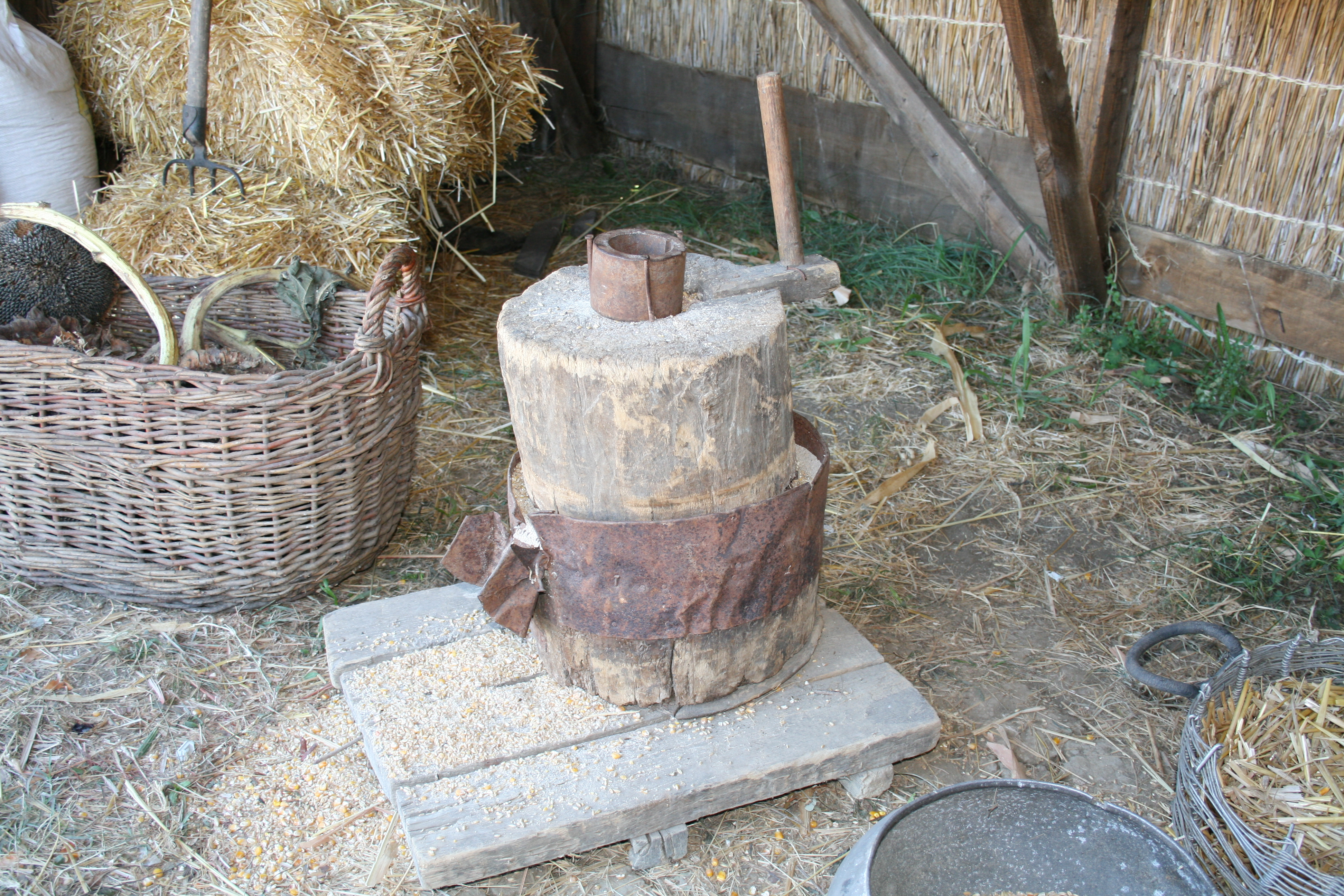 Атамань — этнотуристический комплекс казачей станицы на Таманском полуострове (Краснодарский край).